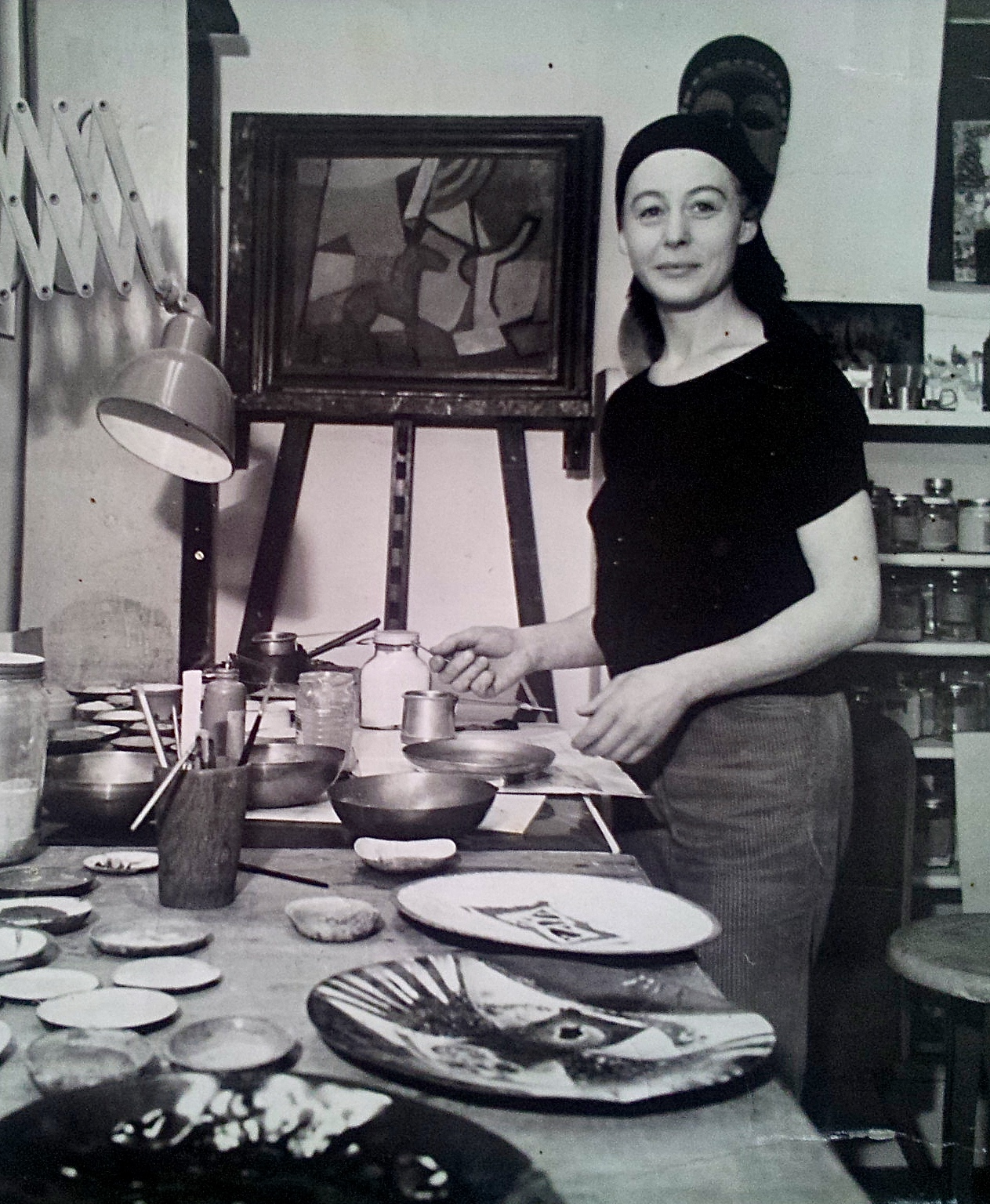 Elisabeth Bunge-Wargau (1926-2005), Kunstmalerin, in der Werkstatt "Bunge-Wargau" in Emmering